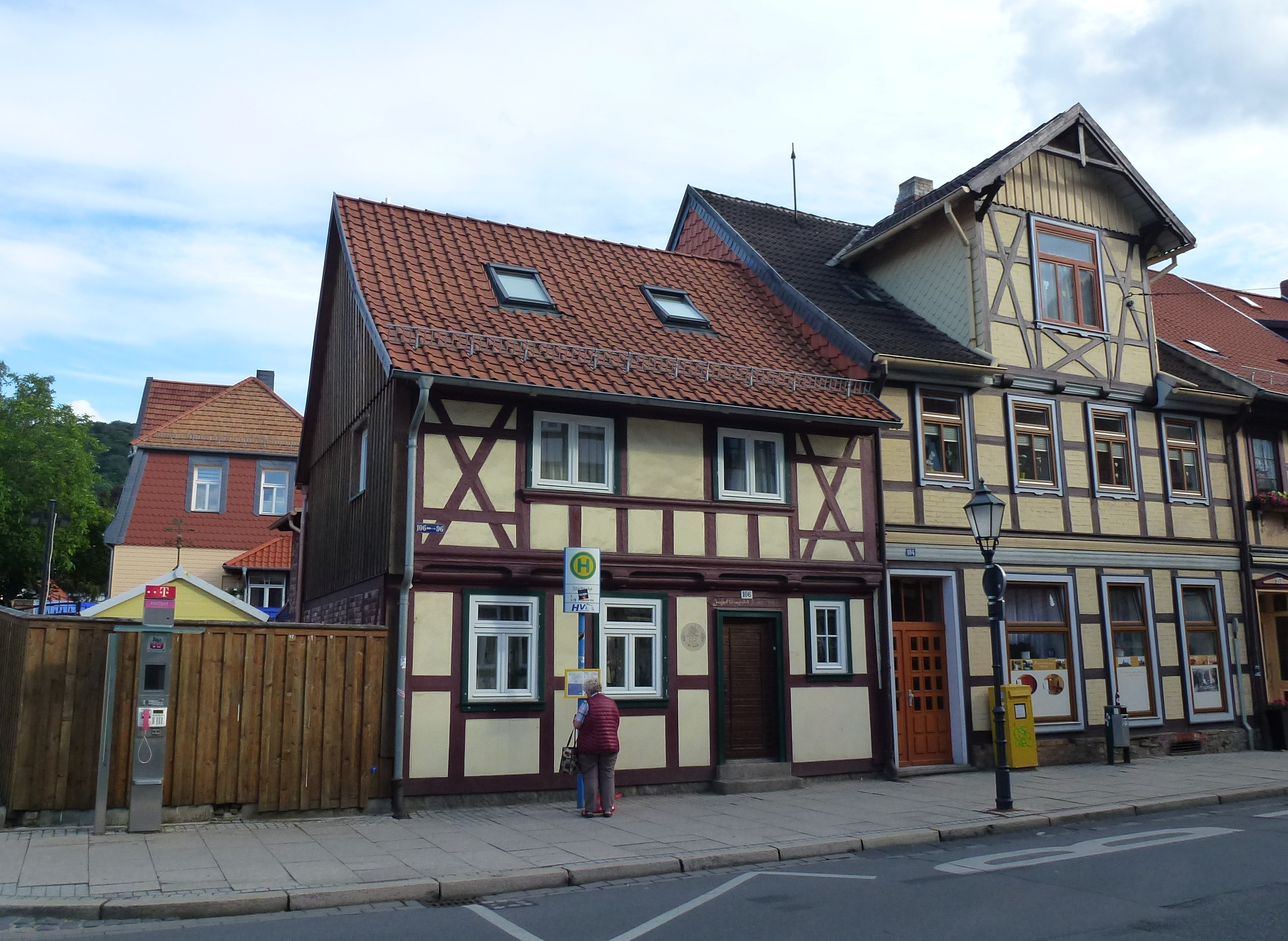 Breite Straße 106 in Wernigerode, erbaut 1708